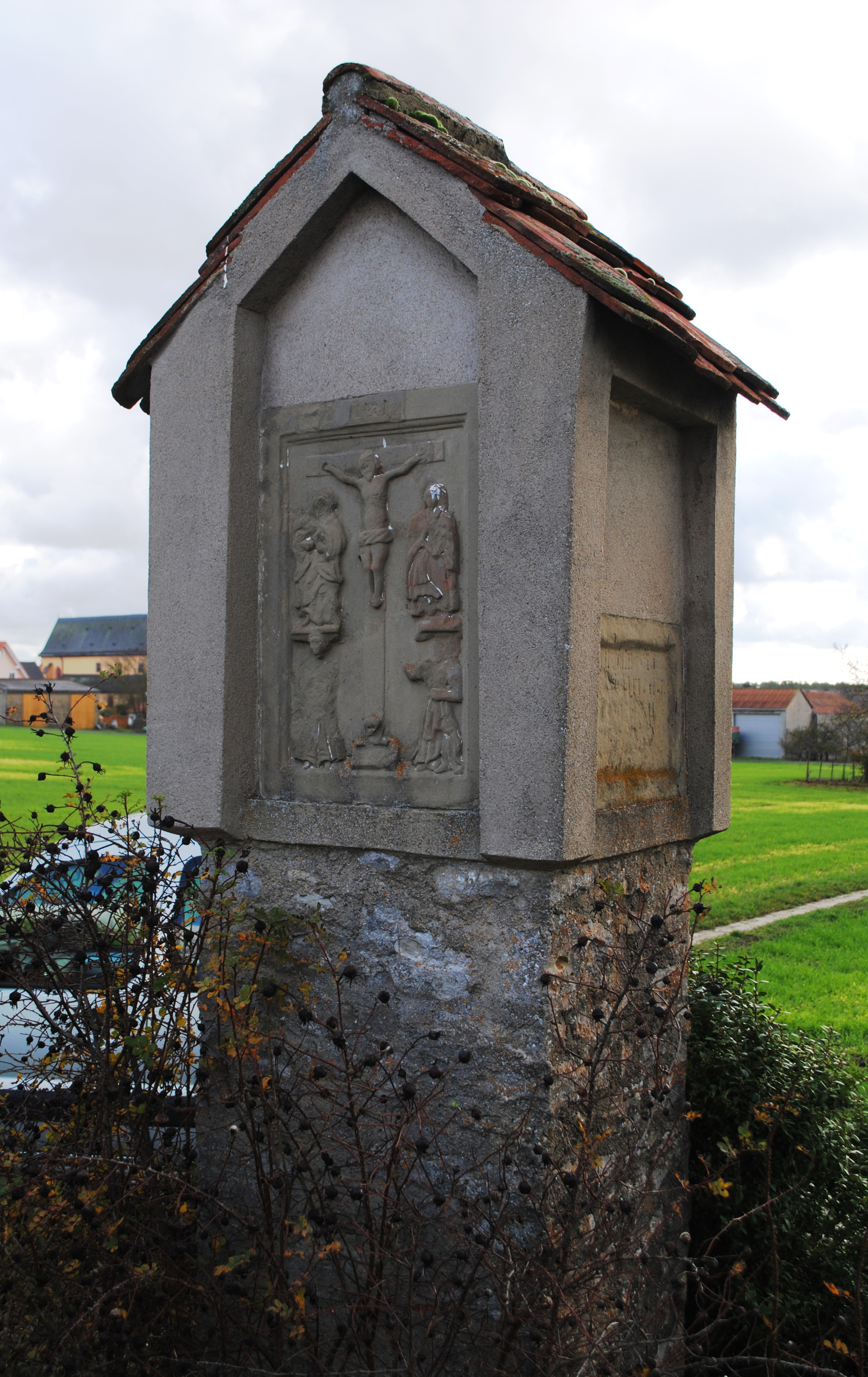 Marterbild, Kunzenberg, Volkach-Dimbach